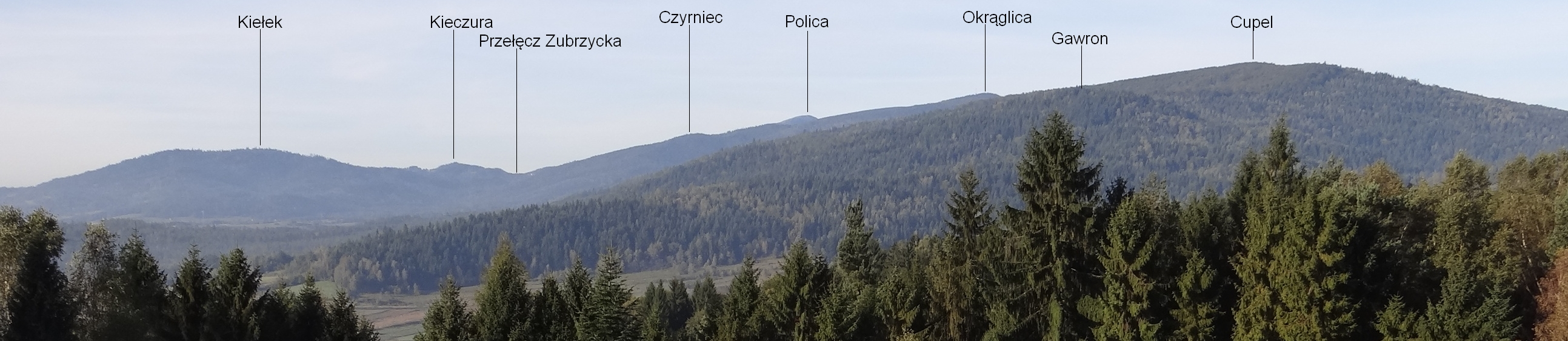 Widok z północnego-wschodu (z okolic wieży przekaźnikowej nad szosą Jordanów-Osielecj)